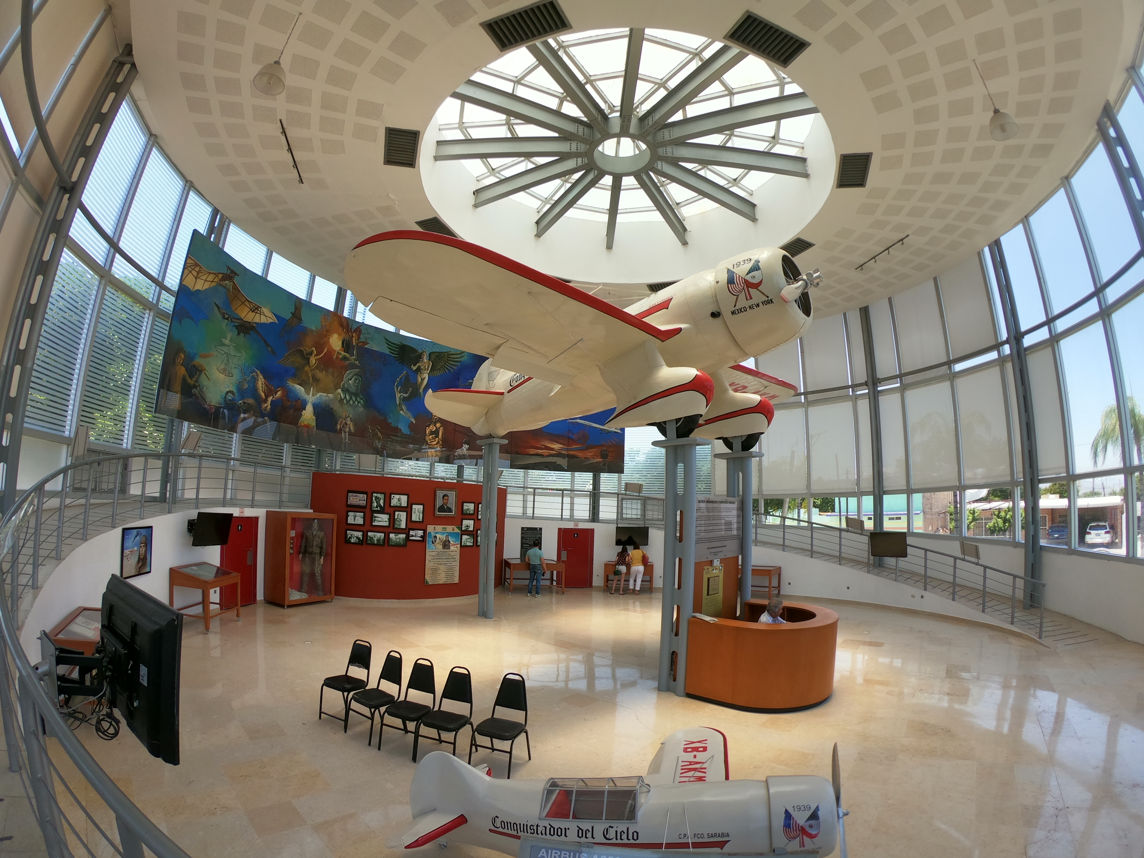 Avión del piloto Francisco Sarabia Tinoco en la ciudad de Lerdo, Durango